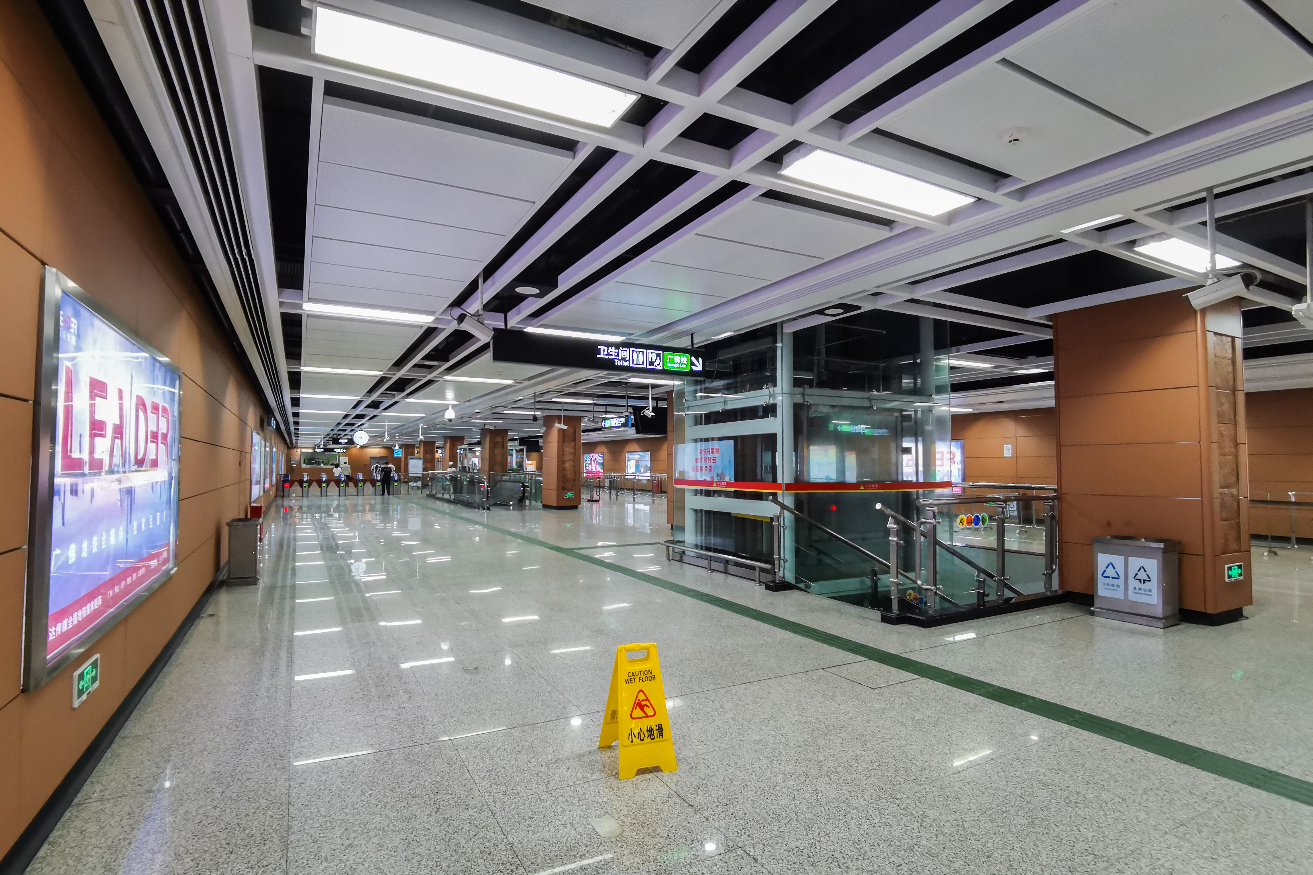 广佛地铁世纪莲站